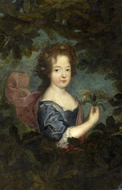 Madame de Montespan, le duc du Maine, le comte de Véxin, mademoiselle de Nantes et mademoiselle de Tours (detail)